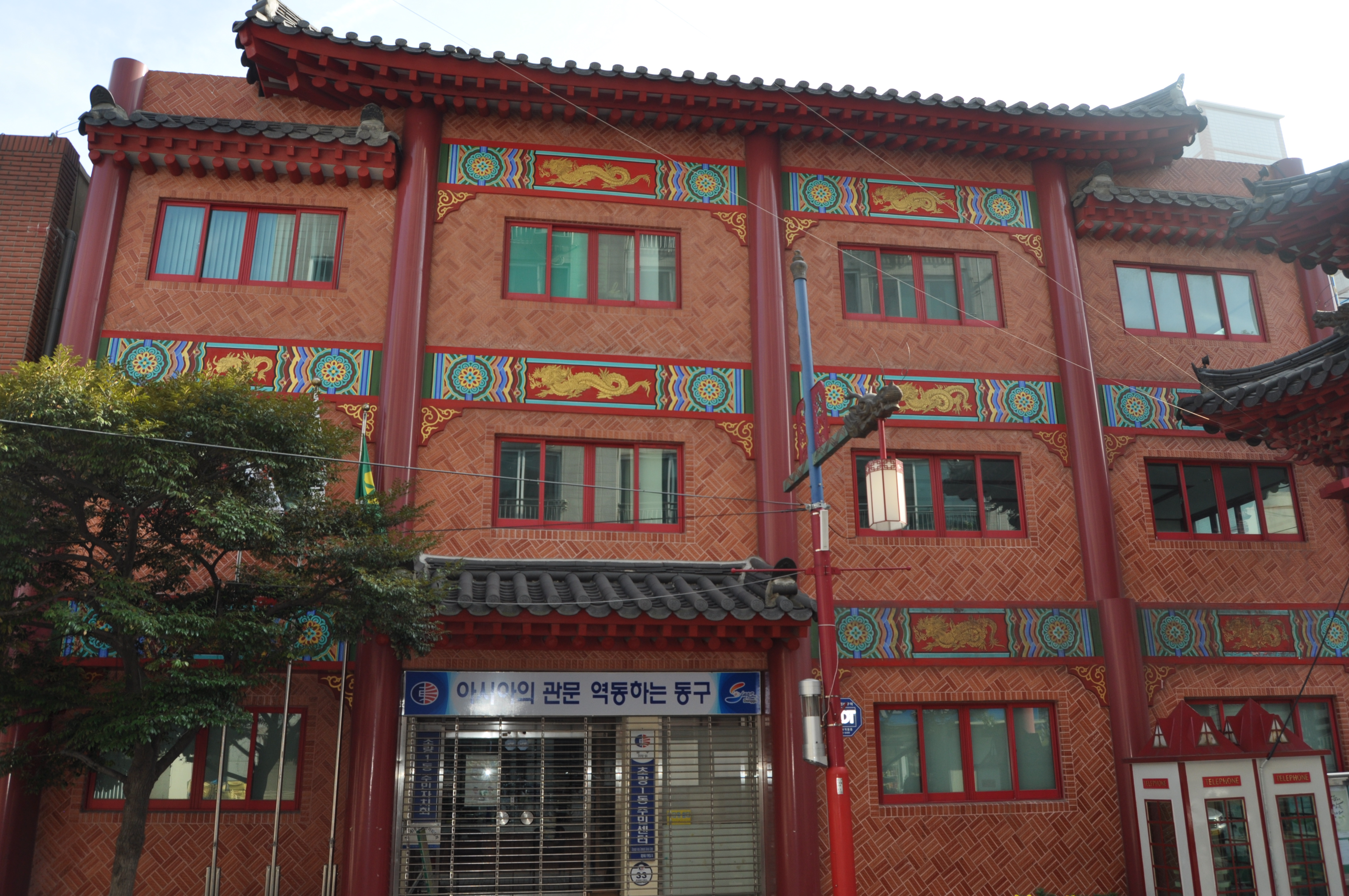 부산광역시 동구 초량1동 주민센터